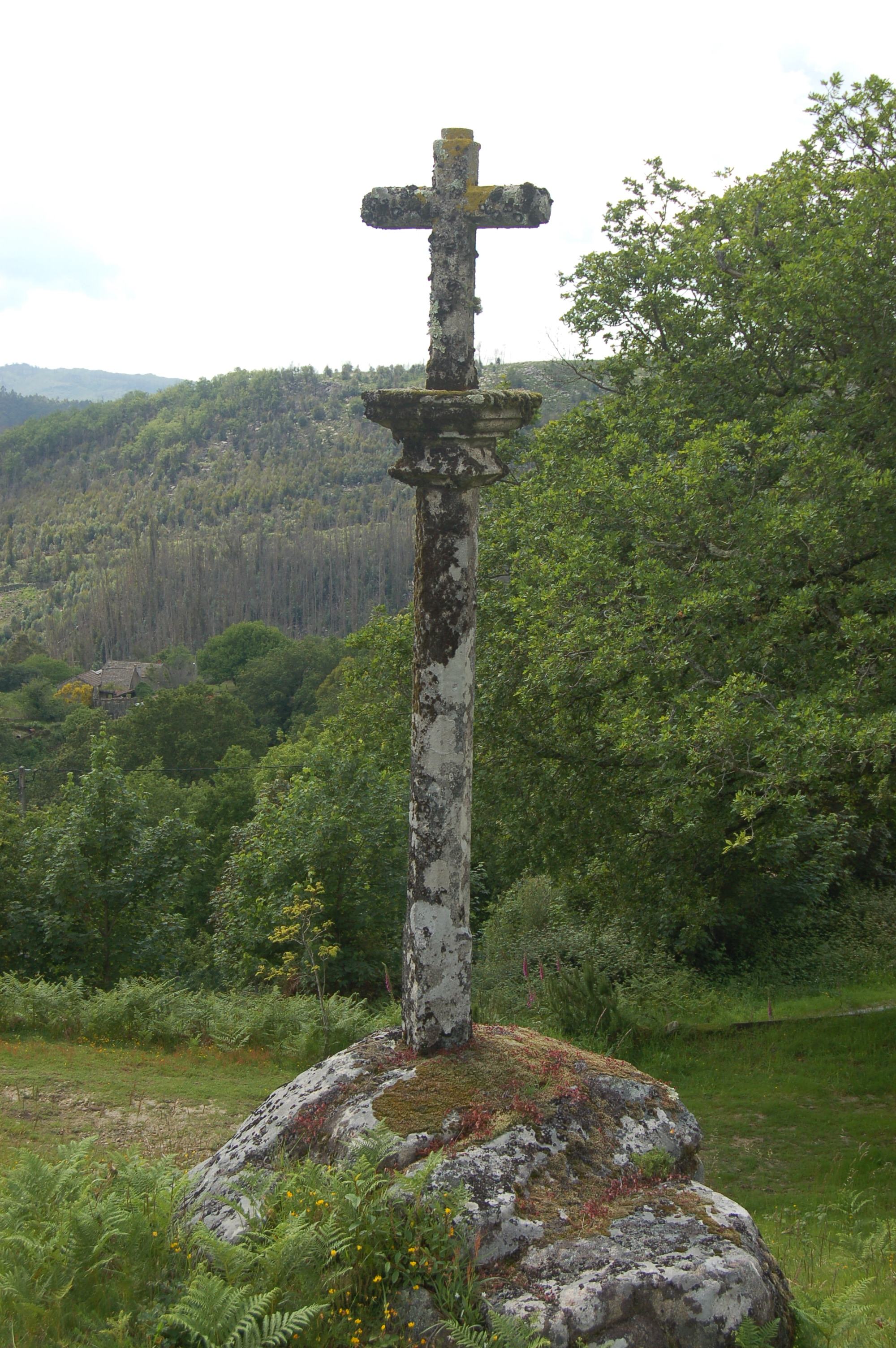 Cruz das Neves, en Ribalta (Loureiro, Cerdedo-Cotobade)